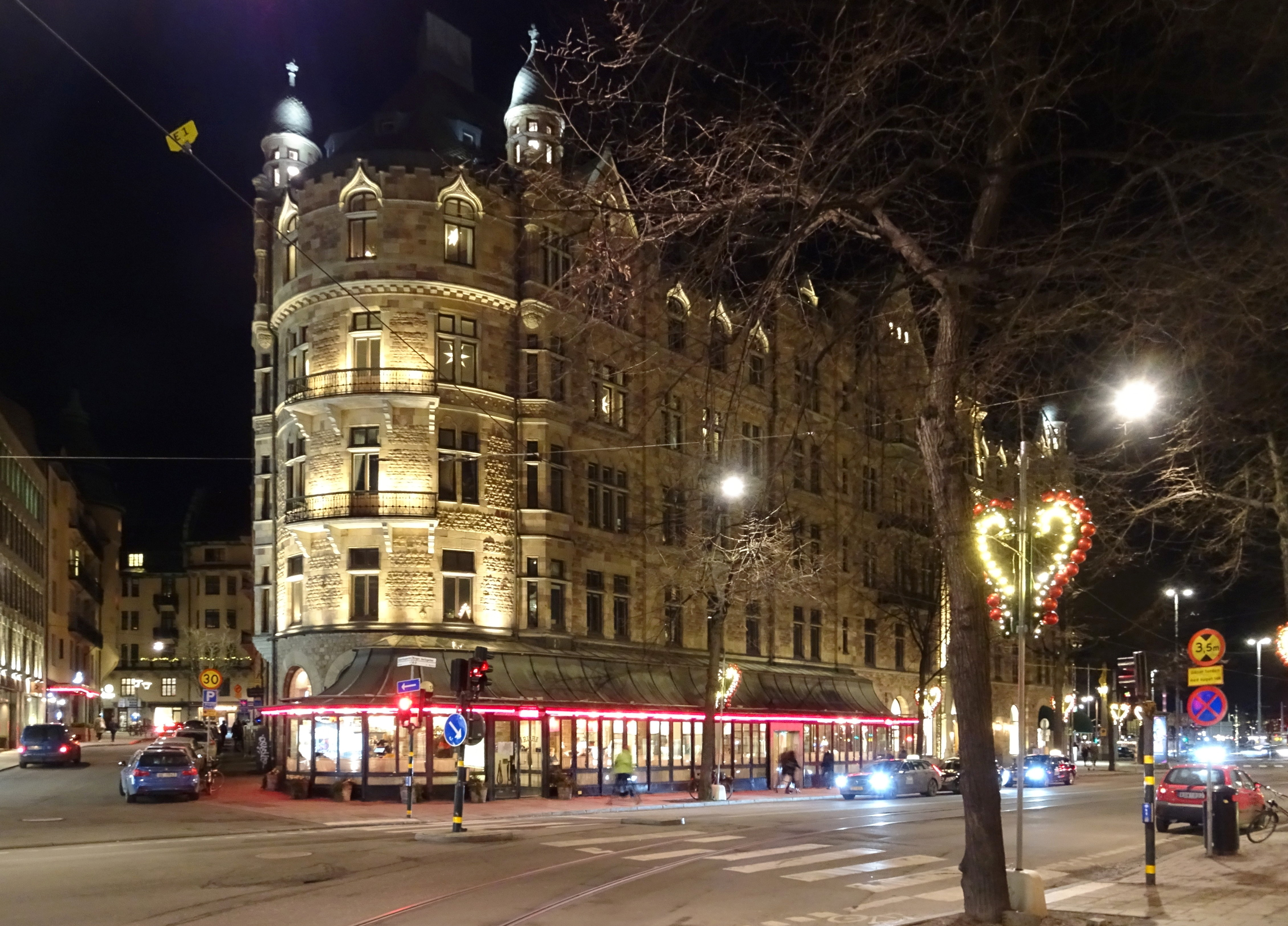 Kvarteret Matrosen och Riches veranda